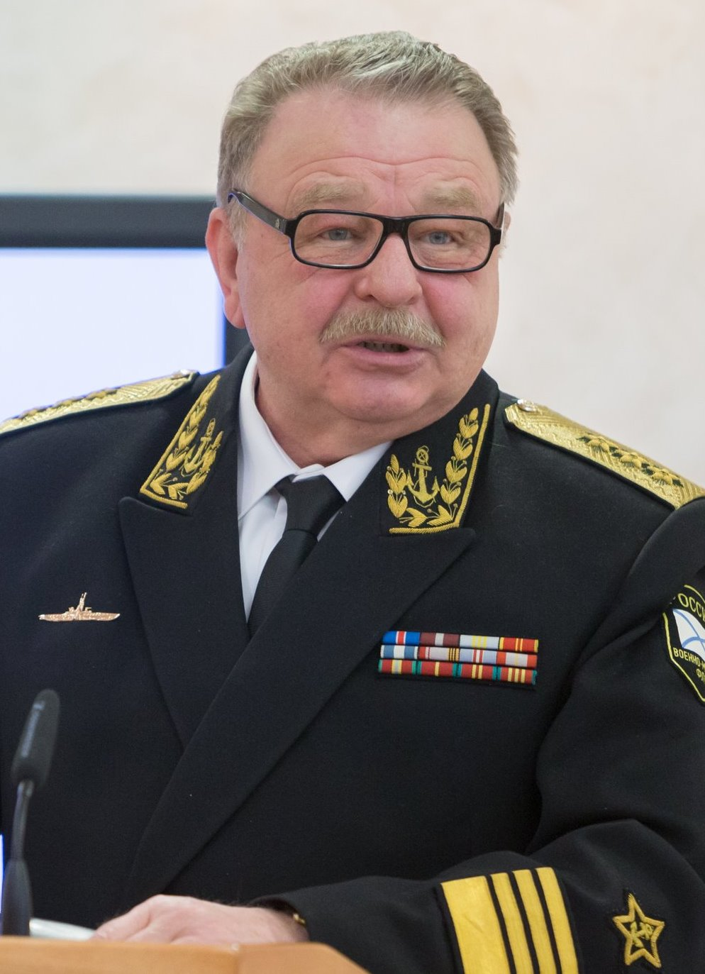 Вячеслав Алексеевич Попов (род. 1946) — российский военно-морской деятель, адмирал